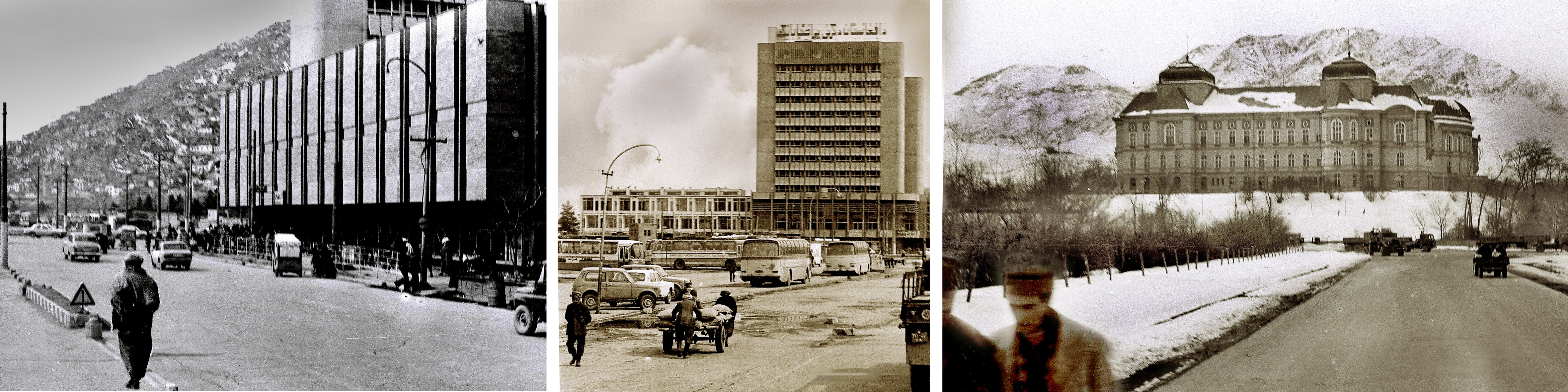 Кабул . Афганистан , Вадим Чуприна 1982